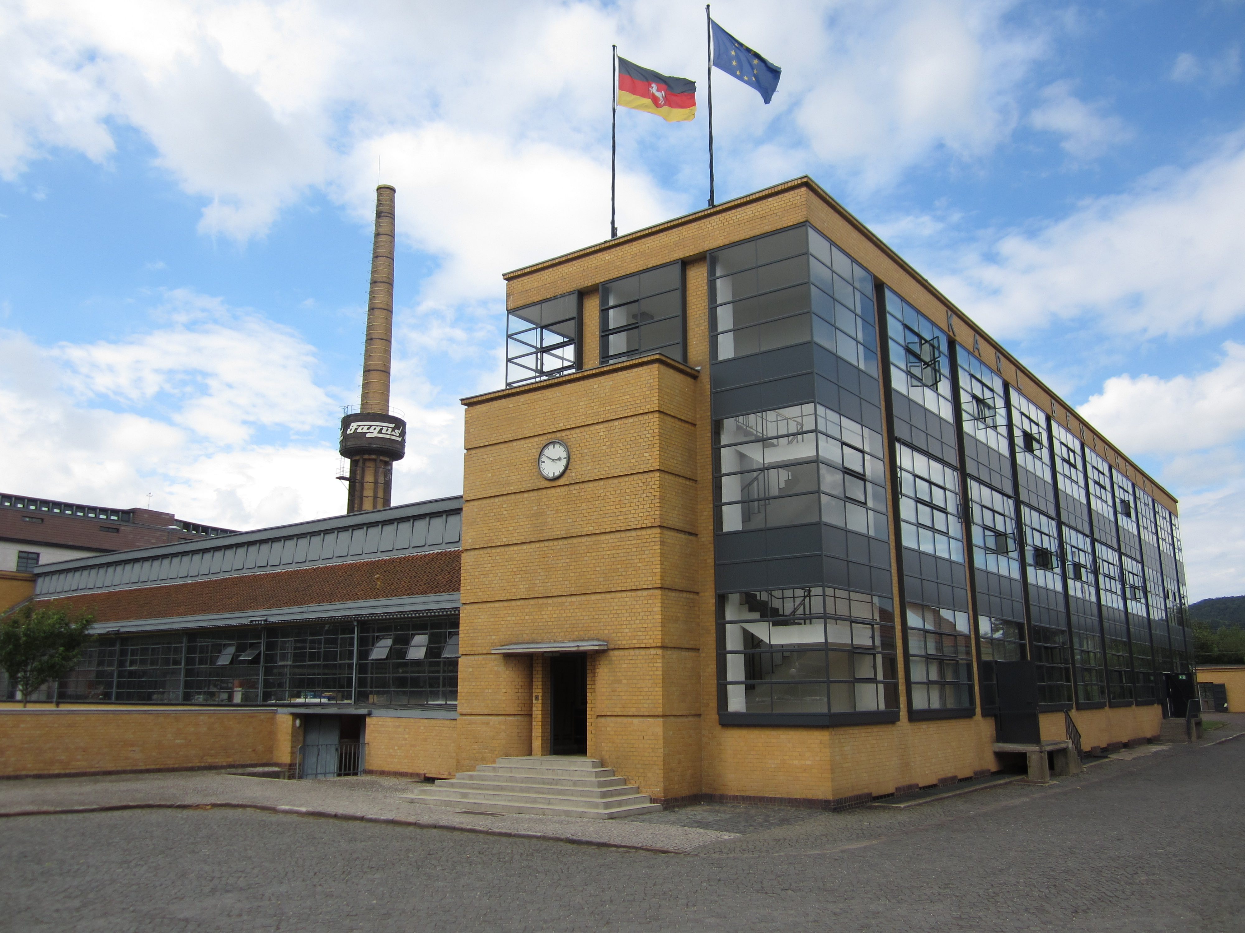 Alfeld: Faguswerk